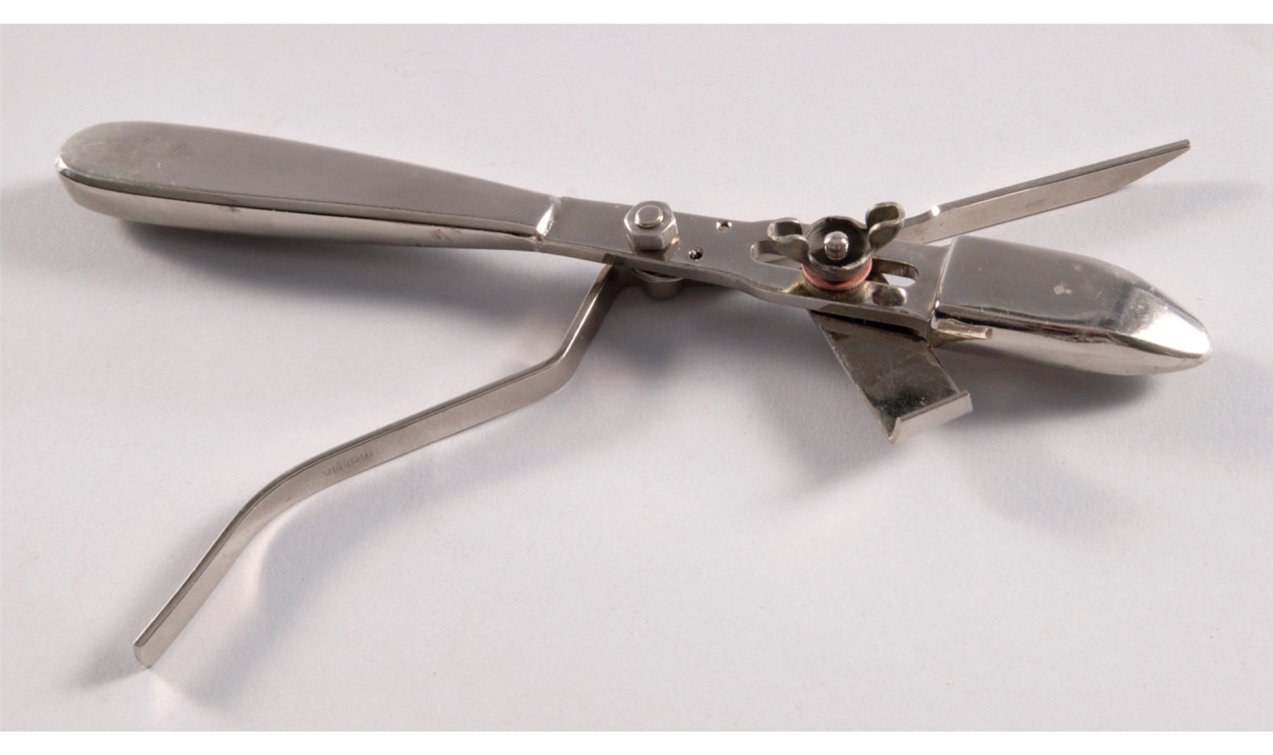 Foto: Sverresborg Trøndelag Folkemuseum